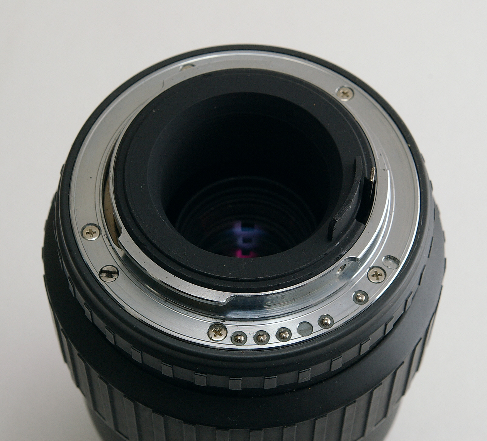 Kamerabajonett Pentax KAF mit Übertragungselementen für Objektivparameter und den Autofokus. Mechanische Blendensteuerung. (SMC Pentax-F Zoom 1:3.5-4.5 35-135mm)